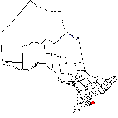 Niagara Region